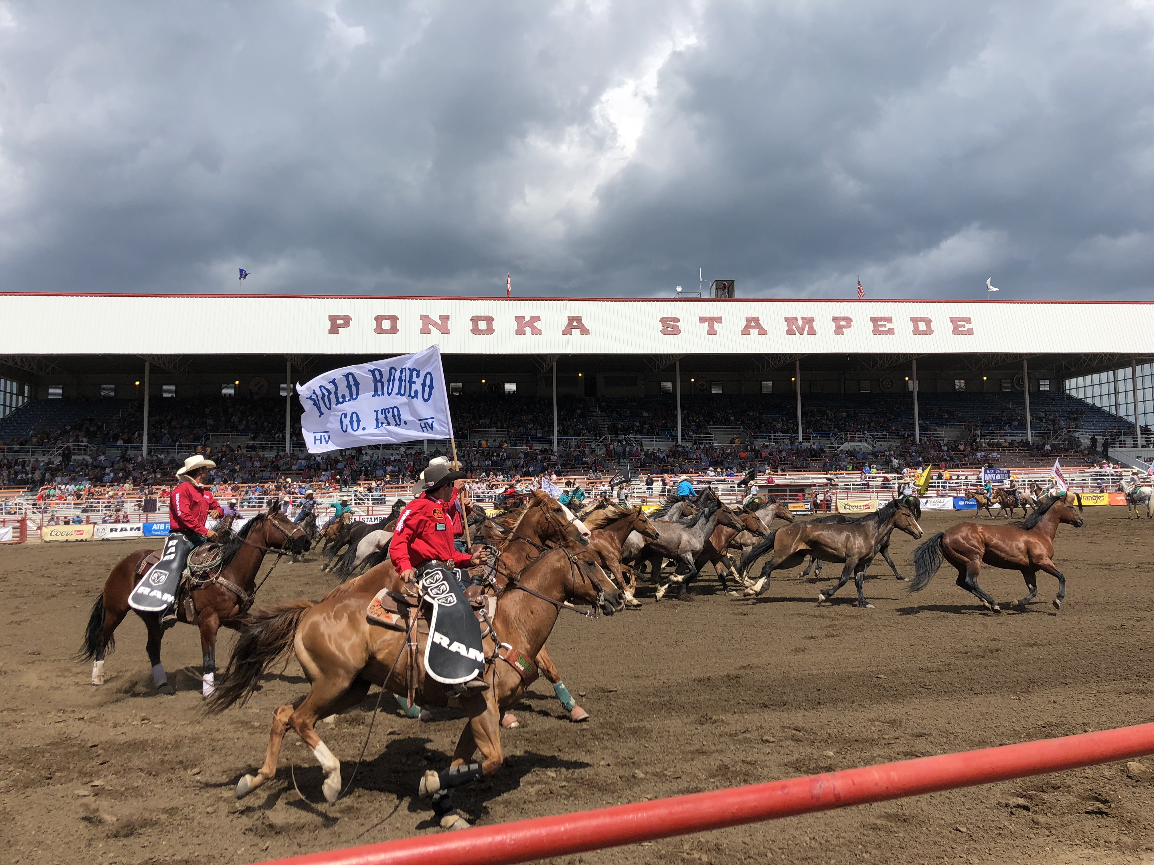 Ponoka Stampede 2018